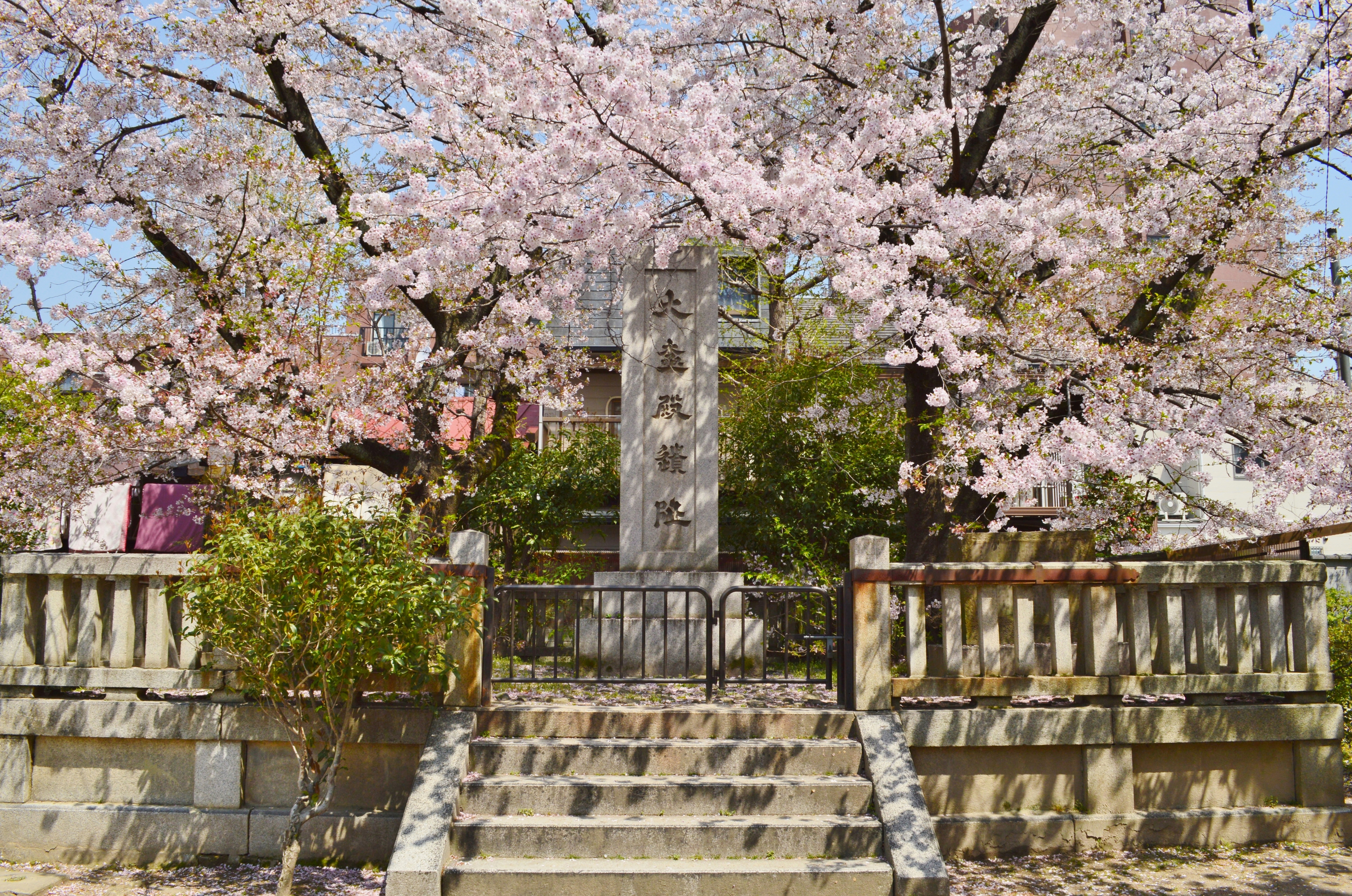 平安京大極殿遺阯碑